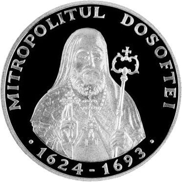 Реверс памятной монеты "380 лет со дня рождения митрополита Дософтея"